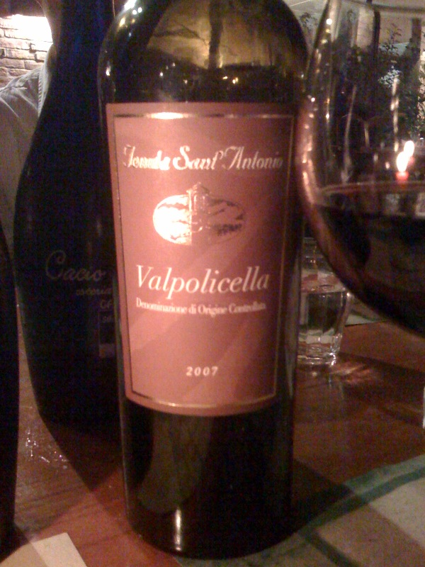 A bottle of the Italian wine Valpolicella, Vendemmia 2007, from Tenuta Sant'Antonio, Mezzane Di Sotto (Verona).